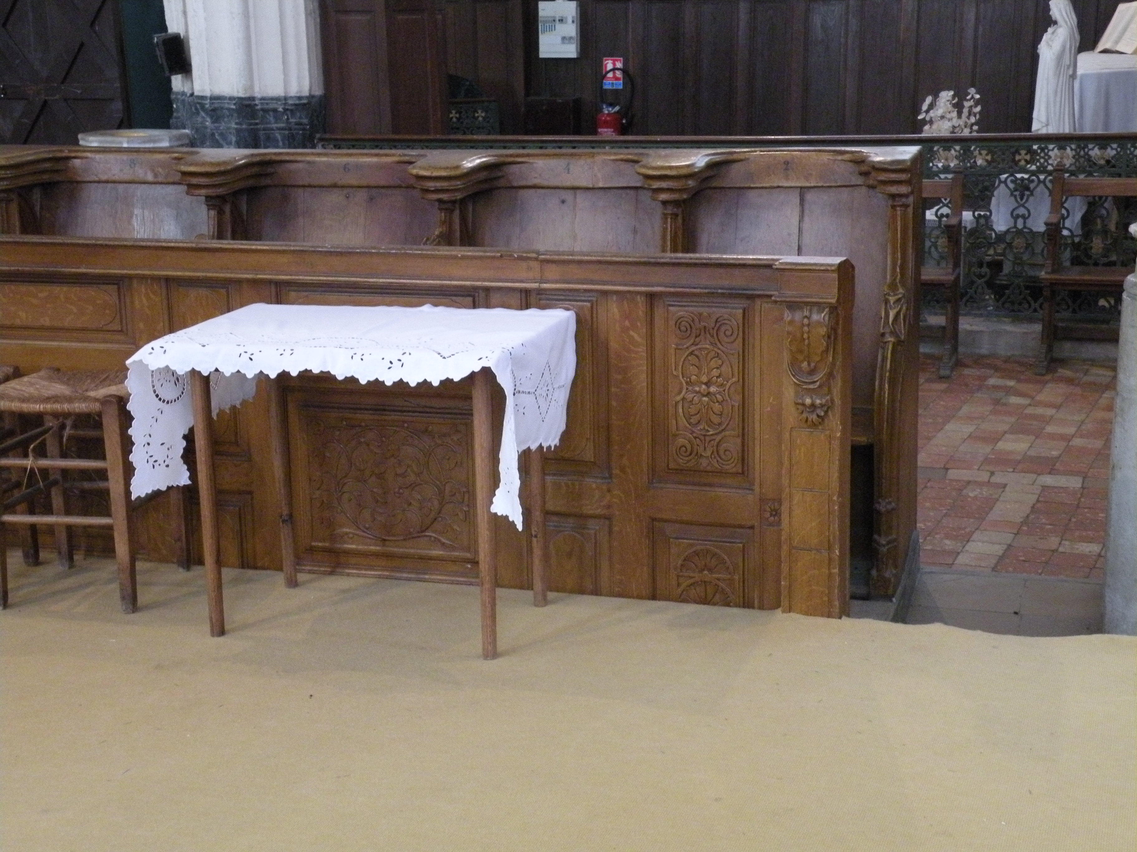 stalle église Chaumont en Vexin